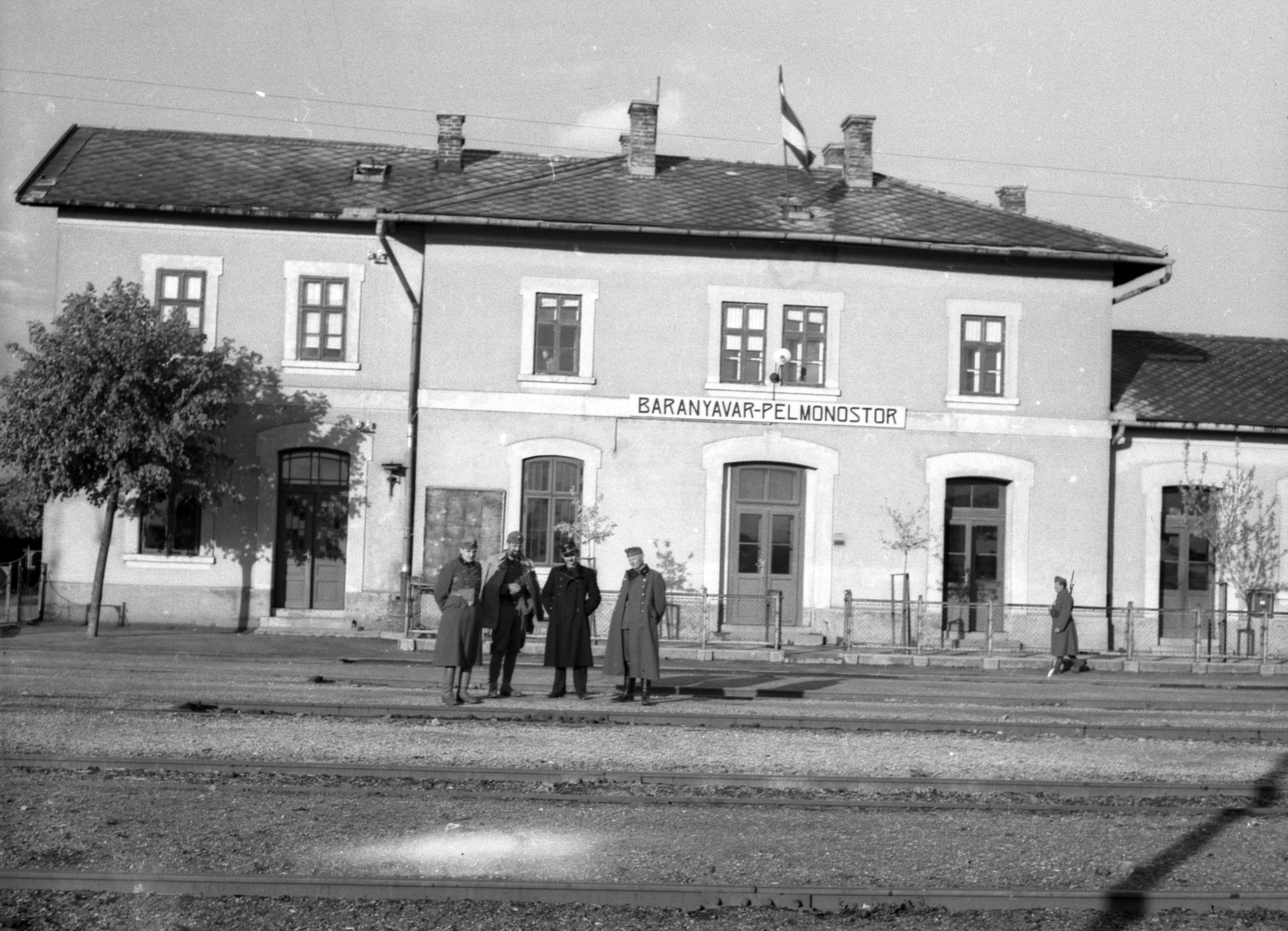 (ekkor Baranyavár-Pélmonostor), vasútállomás. Location: Croatia, Beli Manastir Tags: railway, train station, Hungarian soldier, tableau, flag, place-name signs Title: (ekkor Baranyavár-Pélmonostor), vasútállomás.